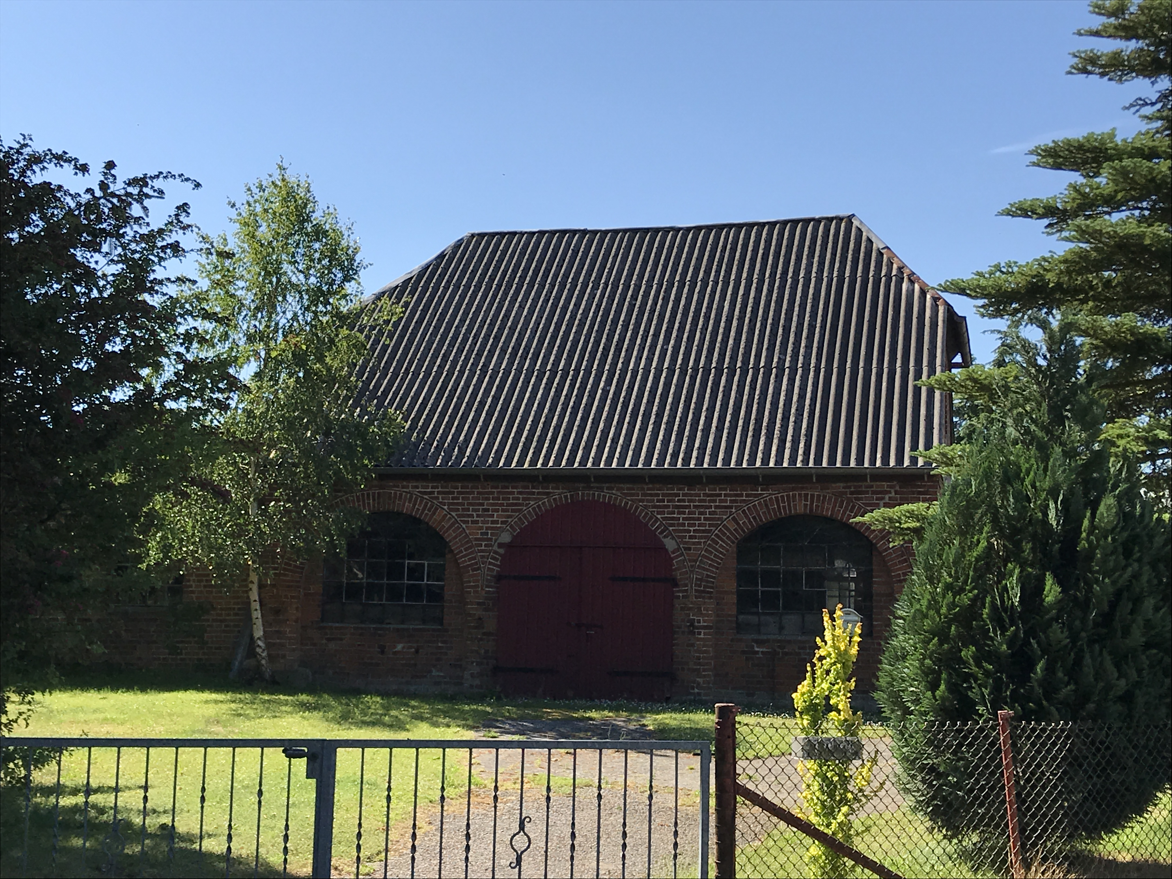 Altenhagen, ein Ortsteil der Gemeinde Velgast in Mecklenburg-Vorpommern